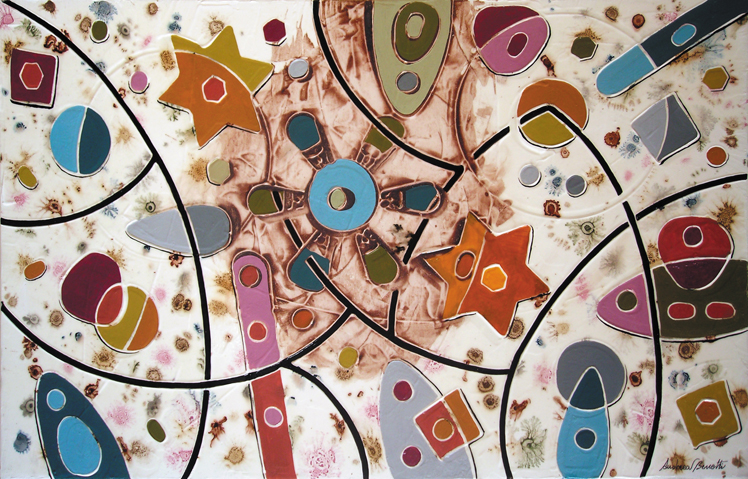 Il mio Universo – Olio e hennè e acrilico su tela, cm 50 x 80, (2009)